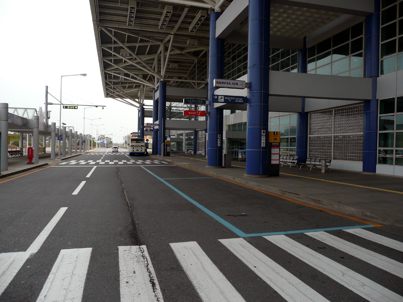 清州国際空港玄関